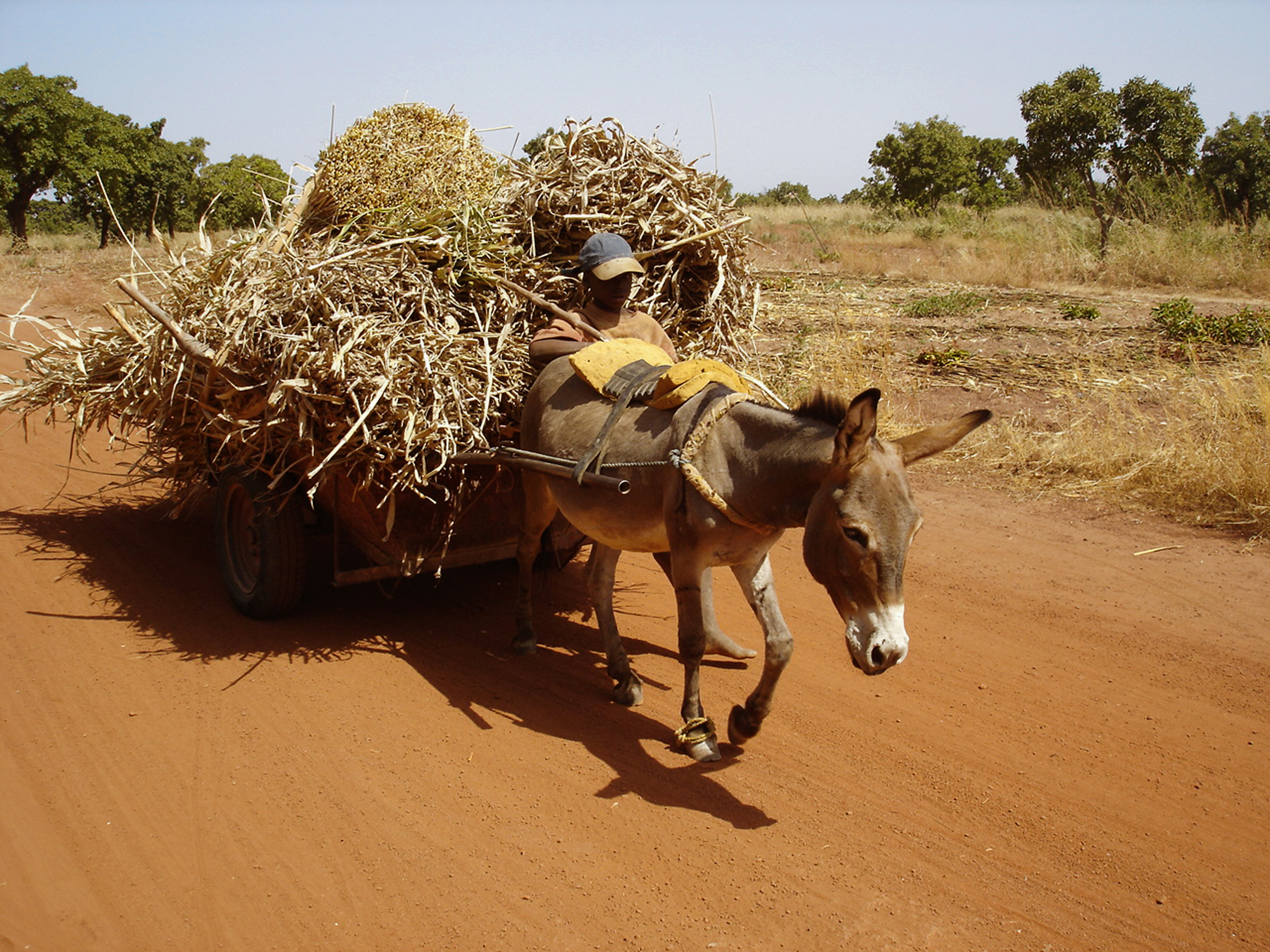 Cariole tirée par un âne sur une piste en entrée de Koudougou.